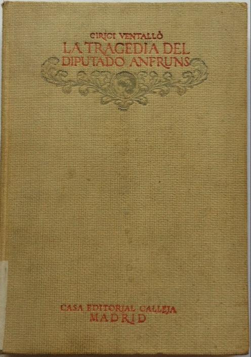 La tragedia del diputado Anfruns